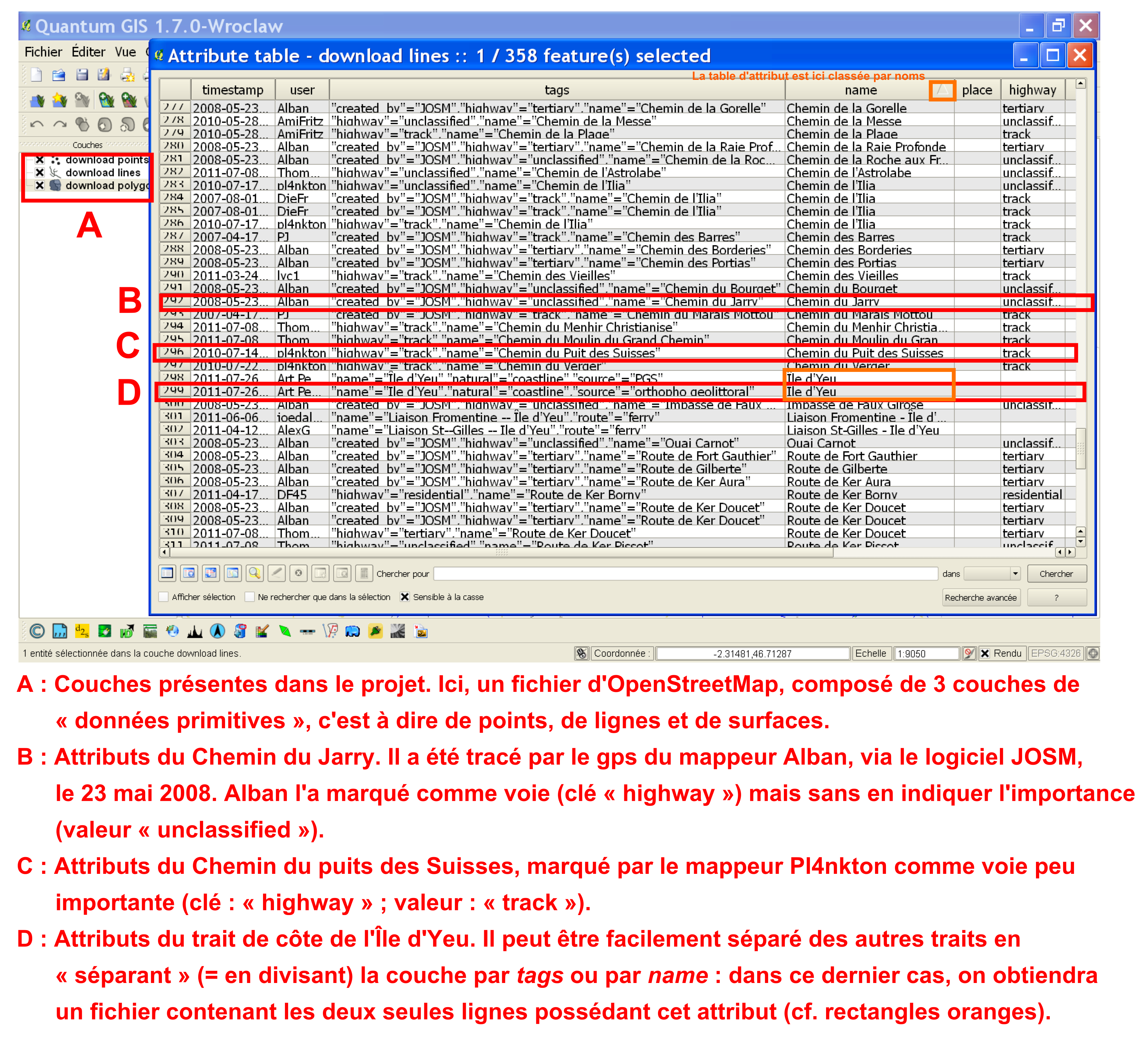 Tutoriel QuantumGIS : une table d'attributs d'une couche d'OpenStreetMap.